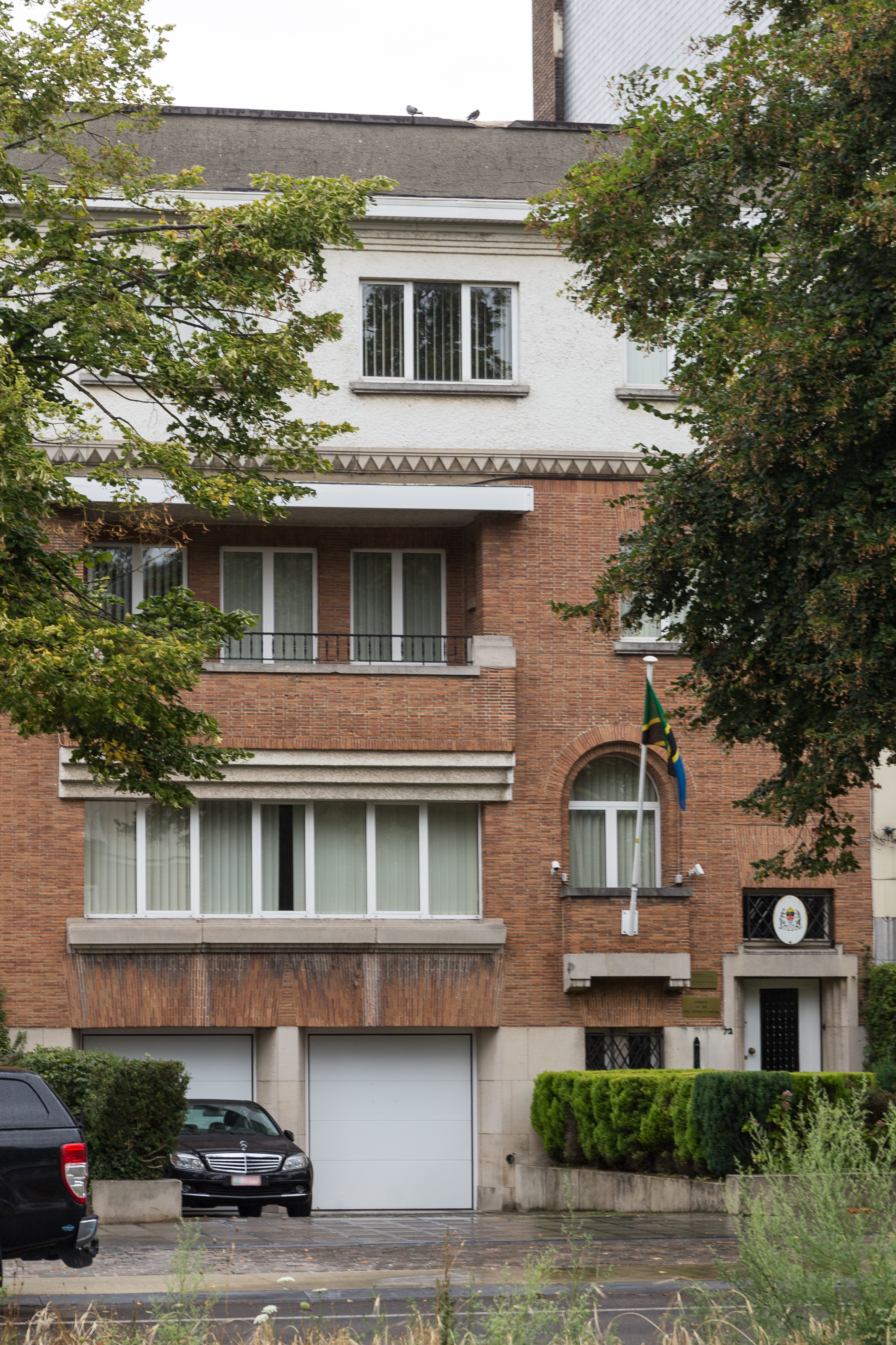 Ambassade de Tanzanie en Belgique, avenue Franklin Roosevelt 72 à Bruxelles.